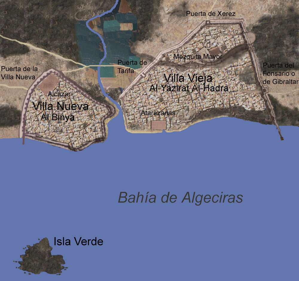 La ciudad de Al-Yazirat Al-Hadra, Algeciras en 1340